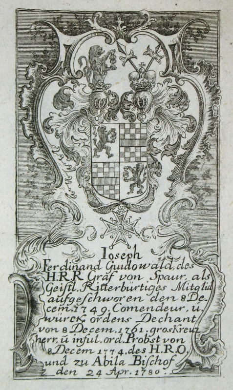 Joseph Ferdinand Guidobald von Spaur (1705-1793), pfalz-bayerischer Hofbischof, Wappenstich als bayerischer St. Georgsritter